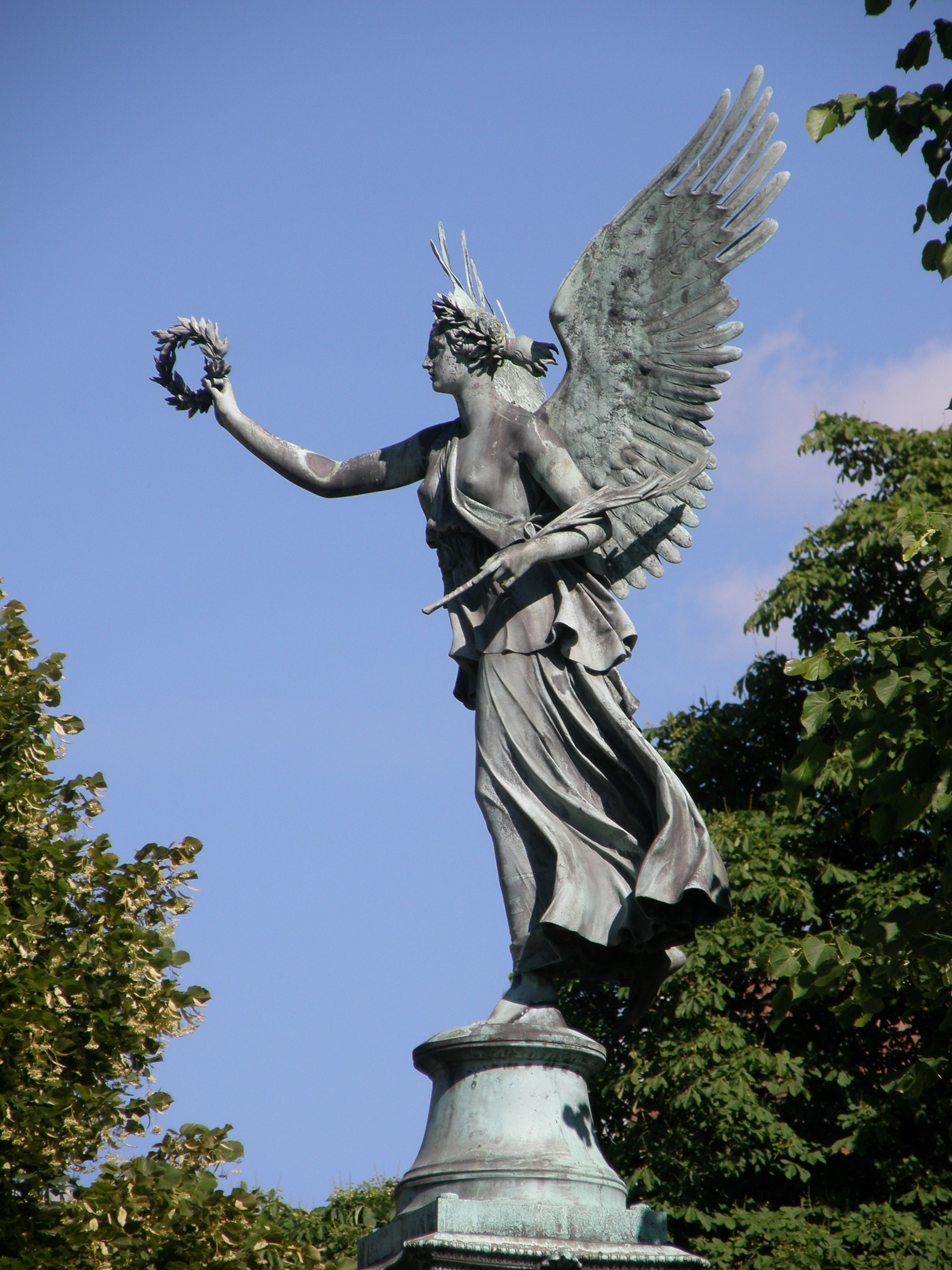 Christian Daniel Rauch - Zwei Friedenssäulen (Detail). 1840, ein Engel (Bronze).